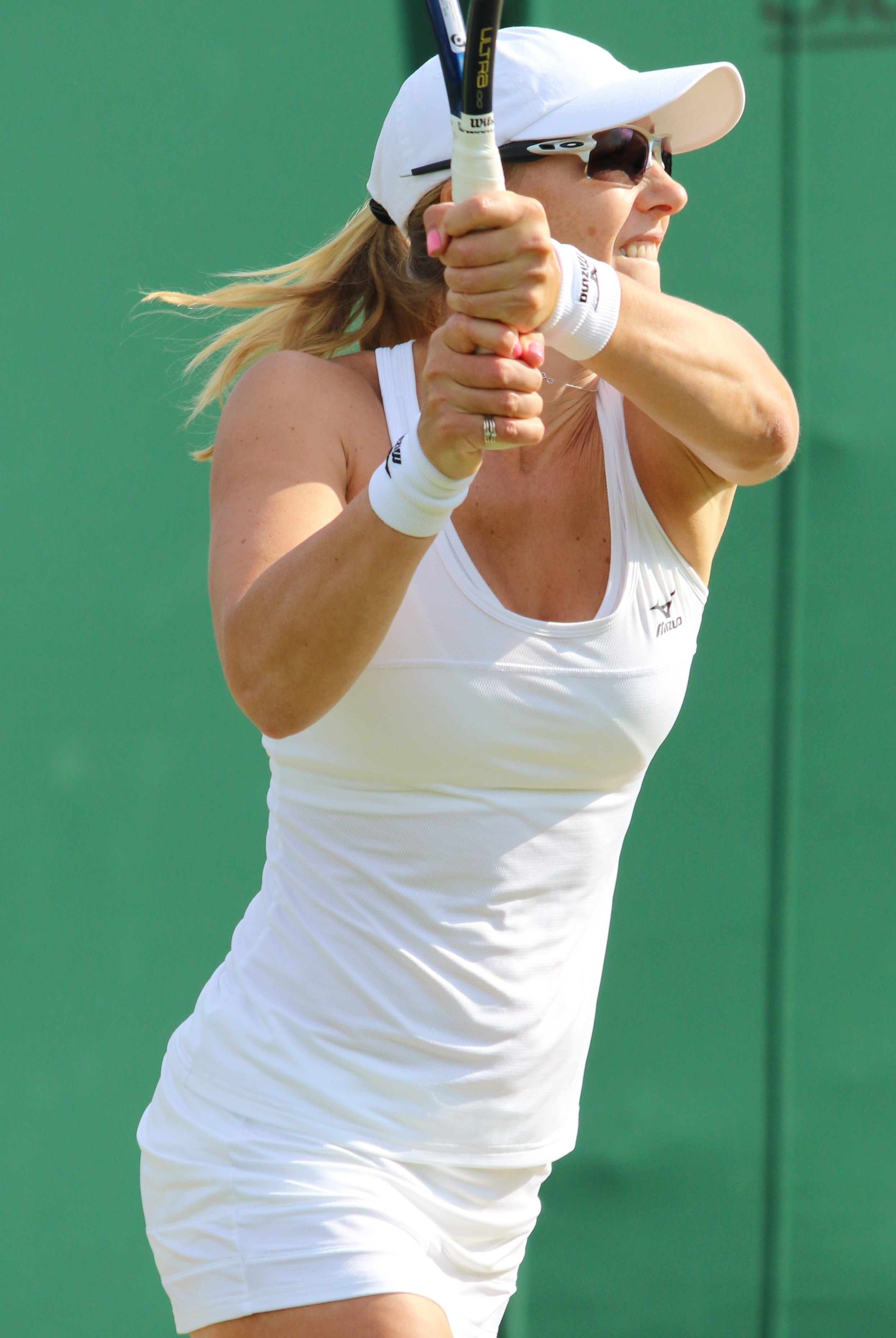 Rodionova An. WM17 (5)